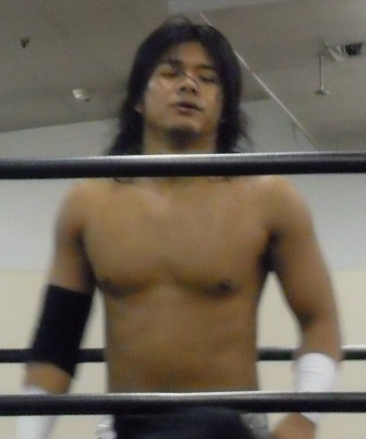 佐々木大輔 2010年10月10日 DDT札幌テイセンホール大会 投稿者撮影